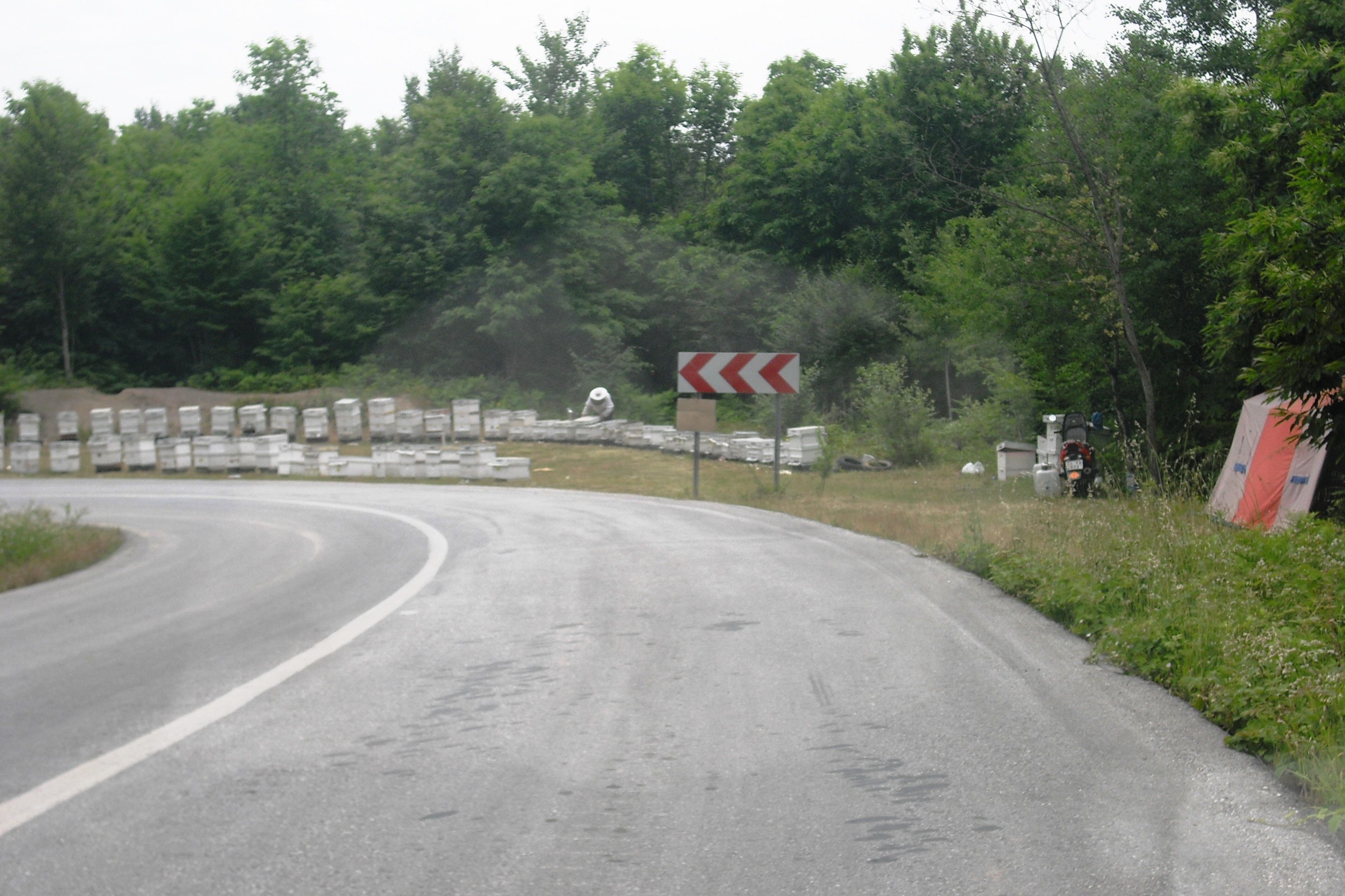 Kocaali-Hendek yolu üzerinde Çamdağında gezgin arıcılar. Genelde Kestane balı üretilir.